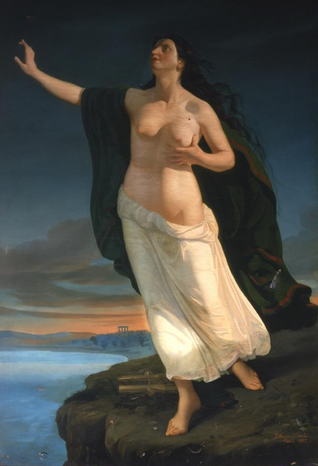 La obra representa a la poetisa Safo arrojándose al mar.